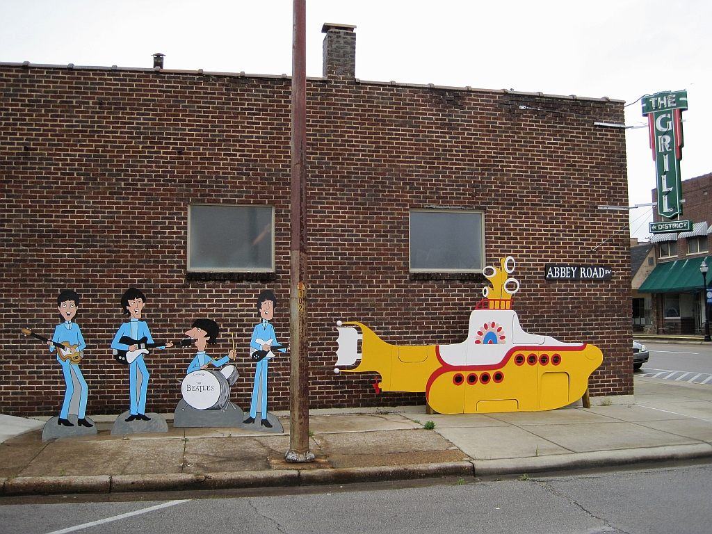 Walnut Ridge, Arkansas.